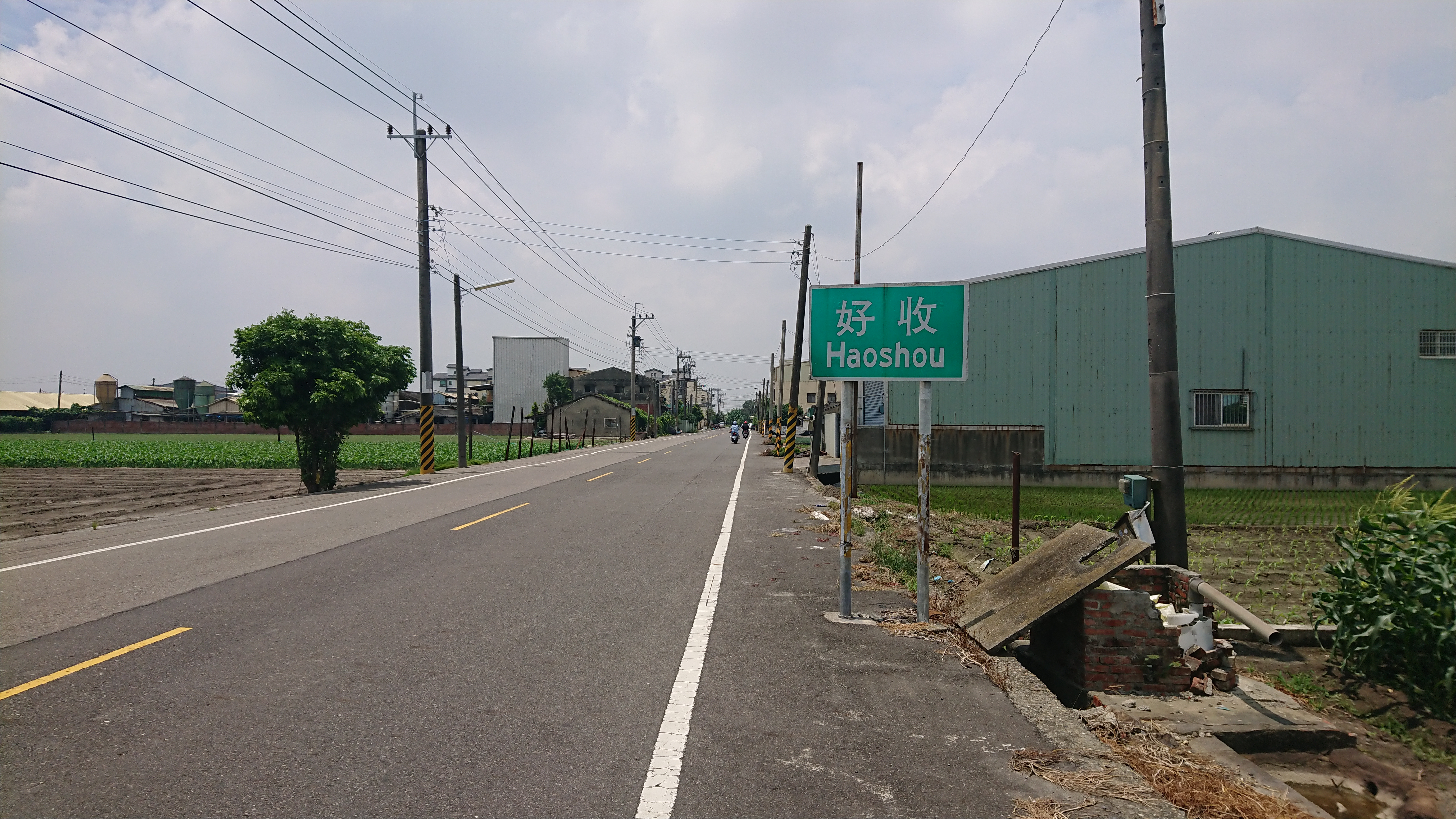 中文（台灣）: 大荖里好收庄地名牌